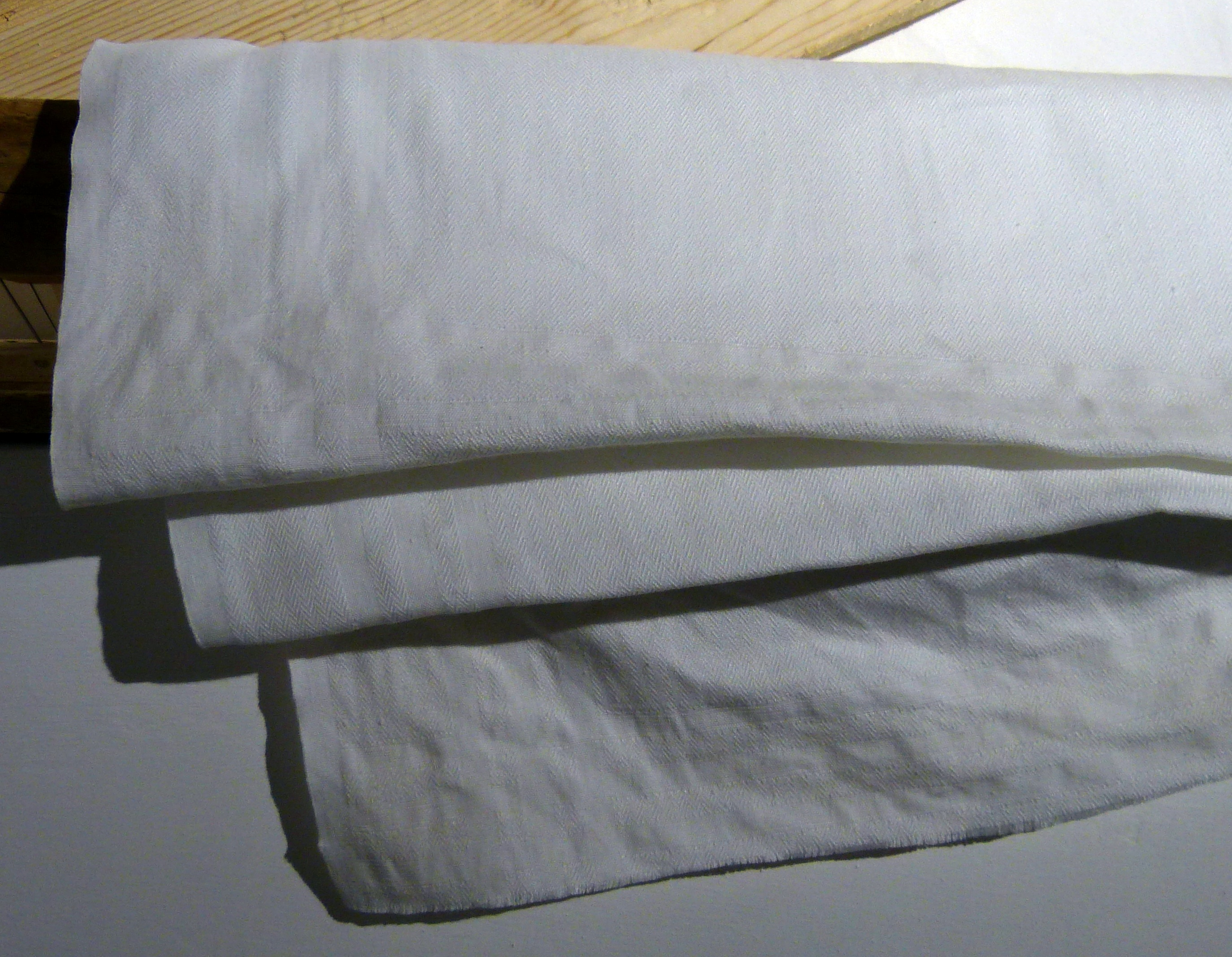 Barchent-Stoff im Fugger-und-Welser-Erlebnismuseum Augsbug.